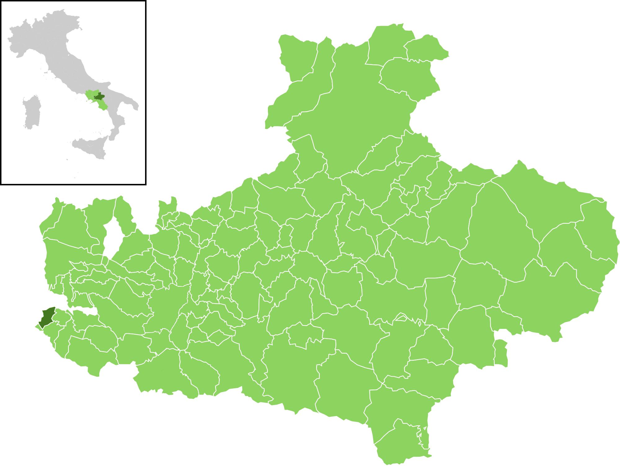 Il comune all'interno della provincia di Avellino